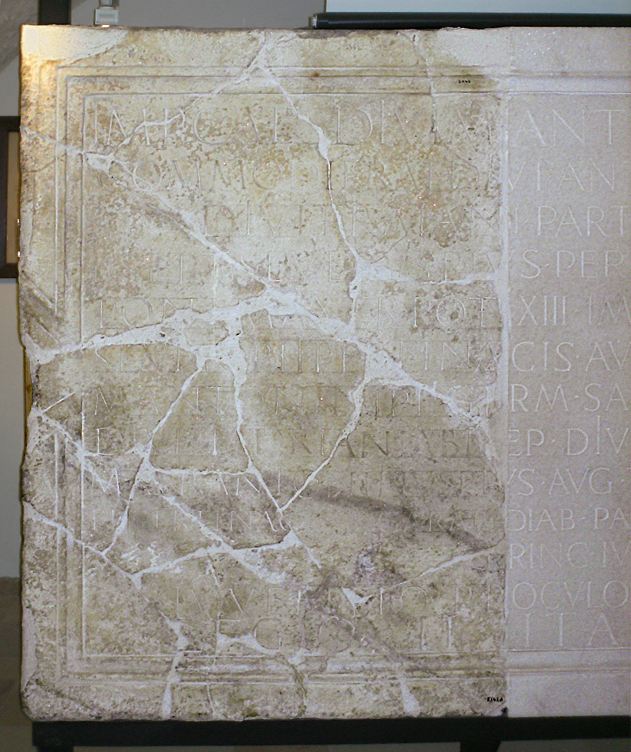 Bruchstücke der Bauinschrift aus der Principa (Römermuseum Enns)